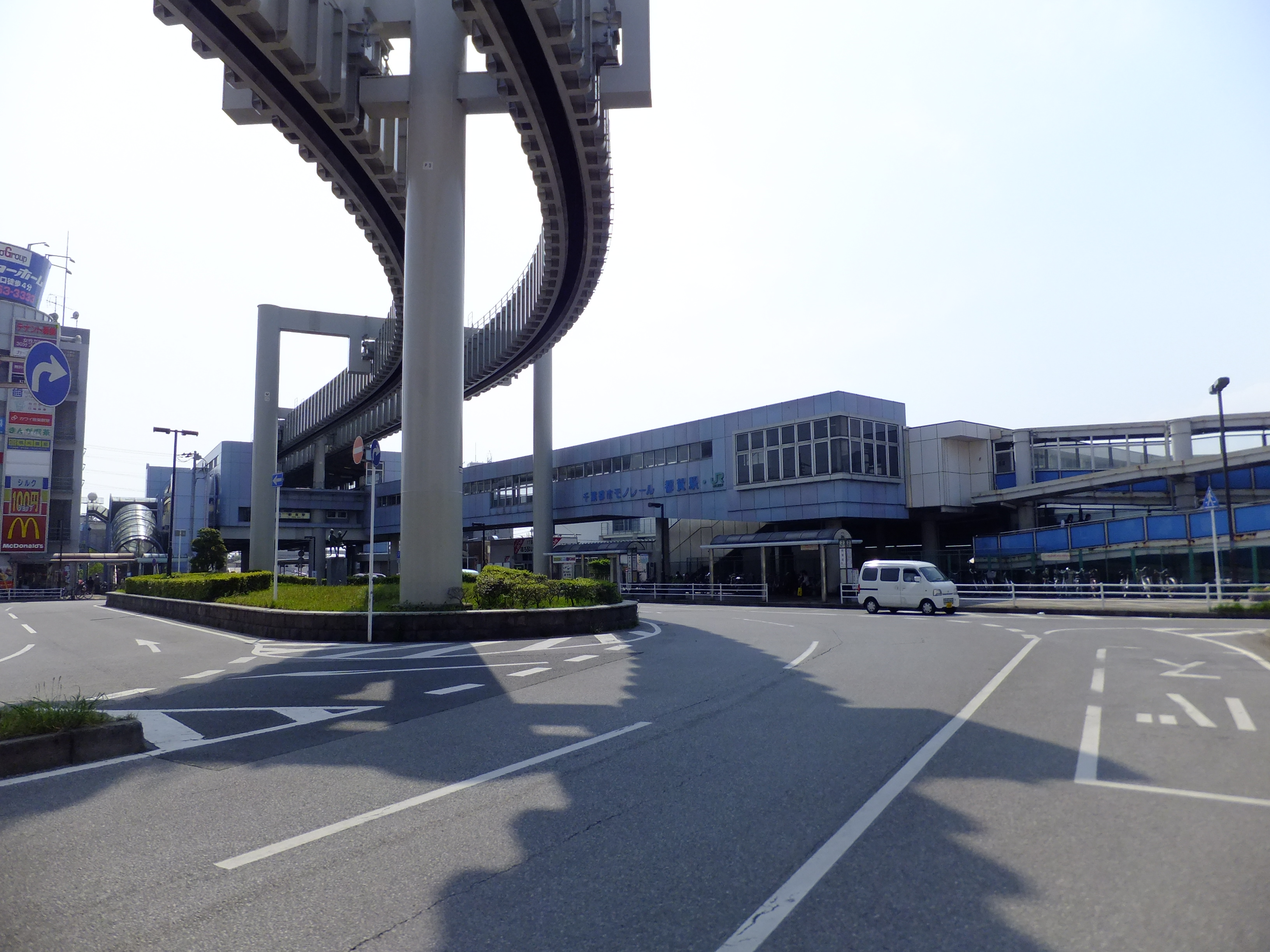 都賀駅東口ロータリー